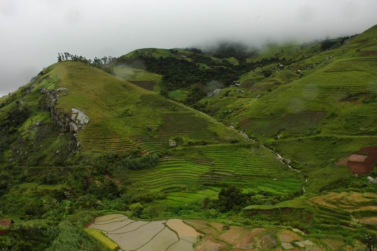 Andringitra